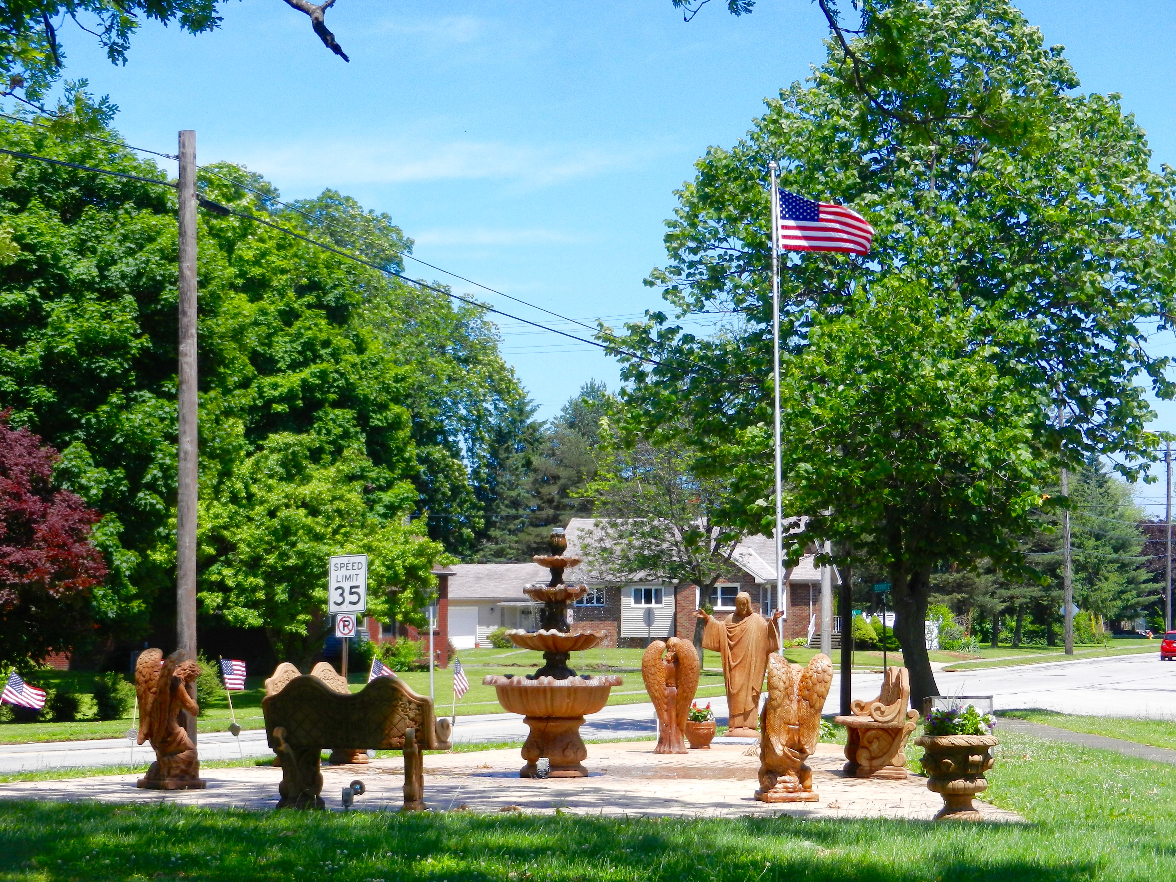 Memorial Statue